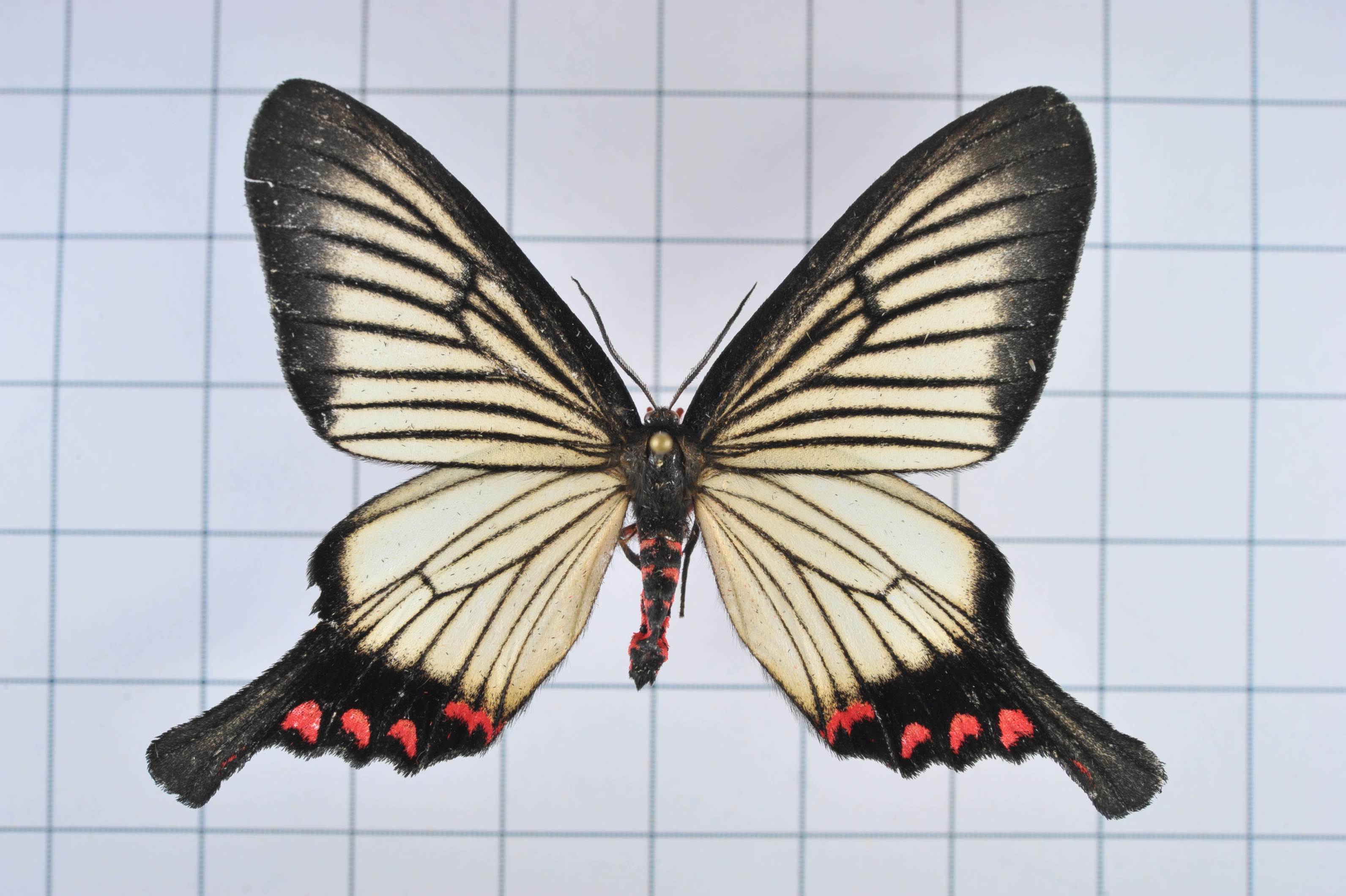 description [ 科名 : Epicopeiidae 鳳蛾科 ] ; [ 屬名 : Epicopeia ] ; [ 學名: Epicopeia hainesii matsumurai ] ; [ 中名: 松村氏淺翅鳳蛾/松村氏淺翅鳳蛾;淺翅鳳蛾/ ] [參考資料 : Waiting for collect ; Page : ]